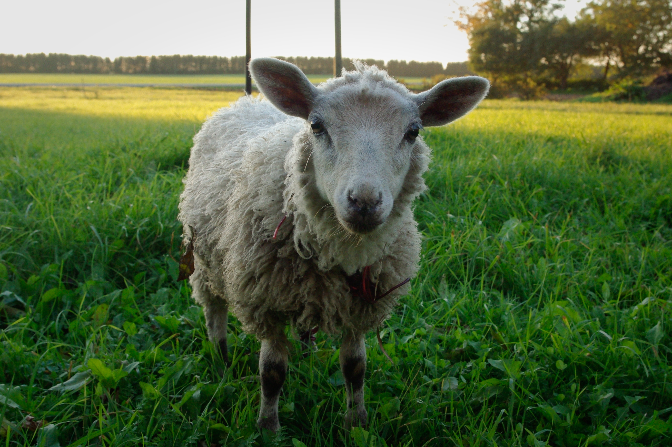 Lambatall